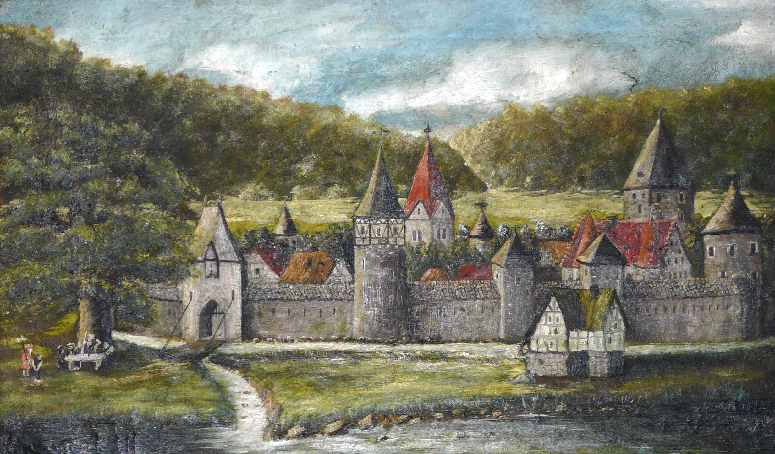 Das Bild befindet sich in der Sammlung des Historischen Zentrums Wuppertal